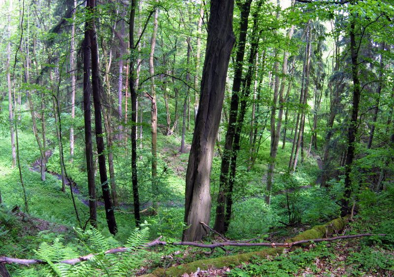 Hluboké údolí Chříčského potoka pod Dubjany se zákrutou. Autor: Adam Hauner Datum: 21. 5. 2006